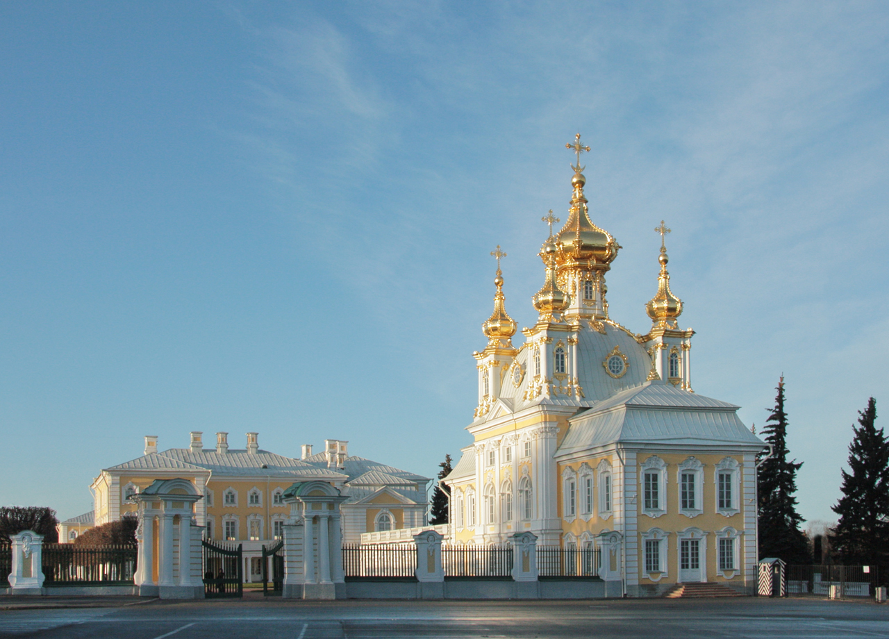 Церковный корпус - часть архитектурного ансамбля Большого Петергофского дворца (Растрелли XVIII век)